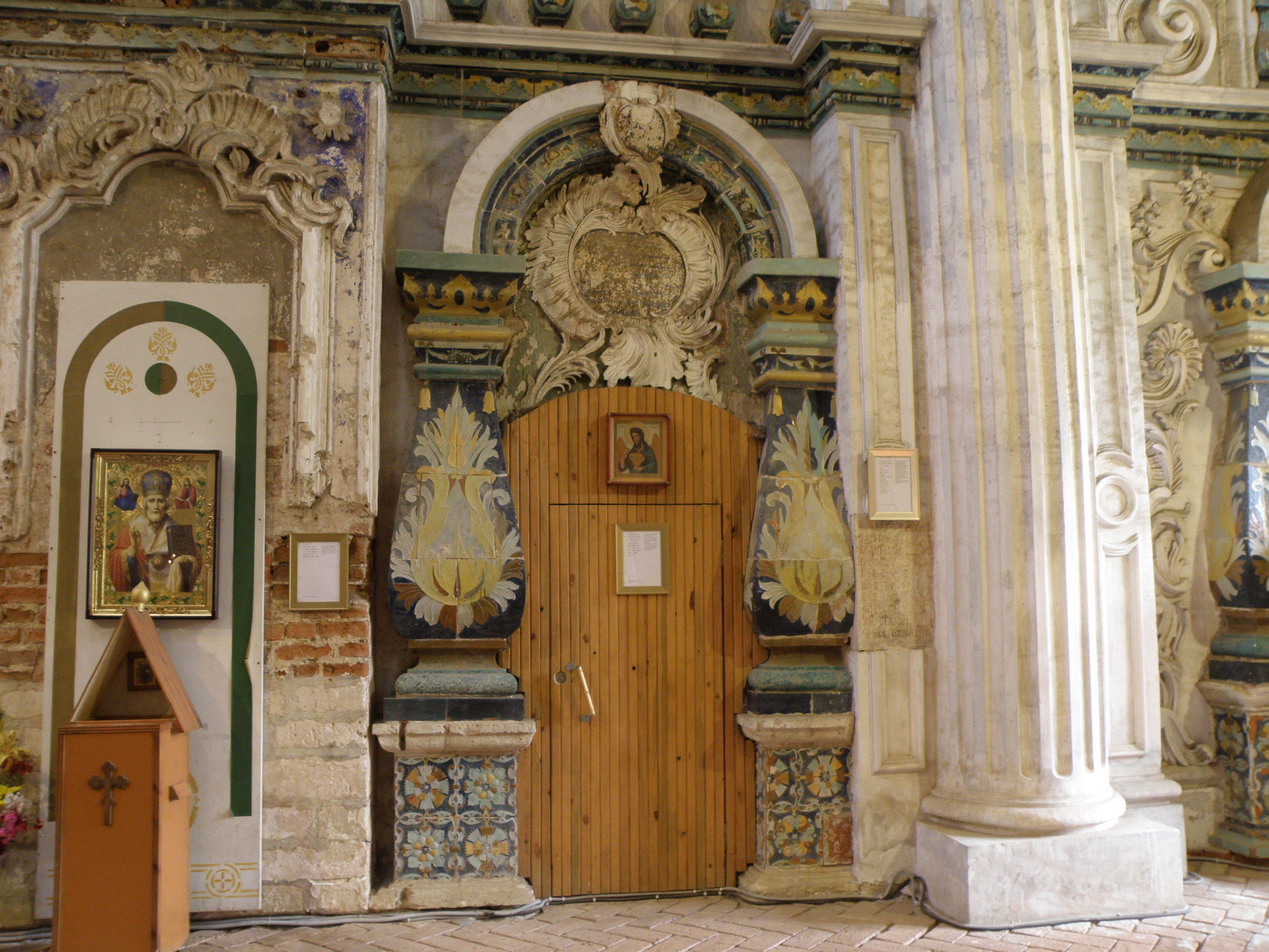 Вход в церковь Усекновения главы Иоанна Предтечи под Голгофой. Белокаменные доски на стенах (правая частично сохранилась) сообщали, что здесь в Храм Гроба Господня находятся гробы Балдуина и его брата Готфрида Бульонского. Детали